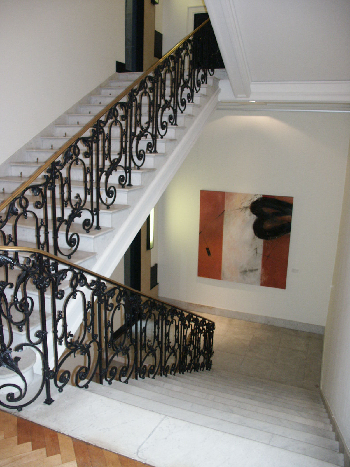 Historisches Treppengeländer in der Landesvertretung von Hamburg in Berlin